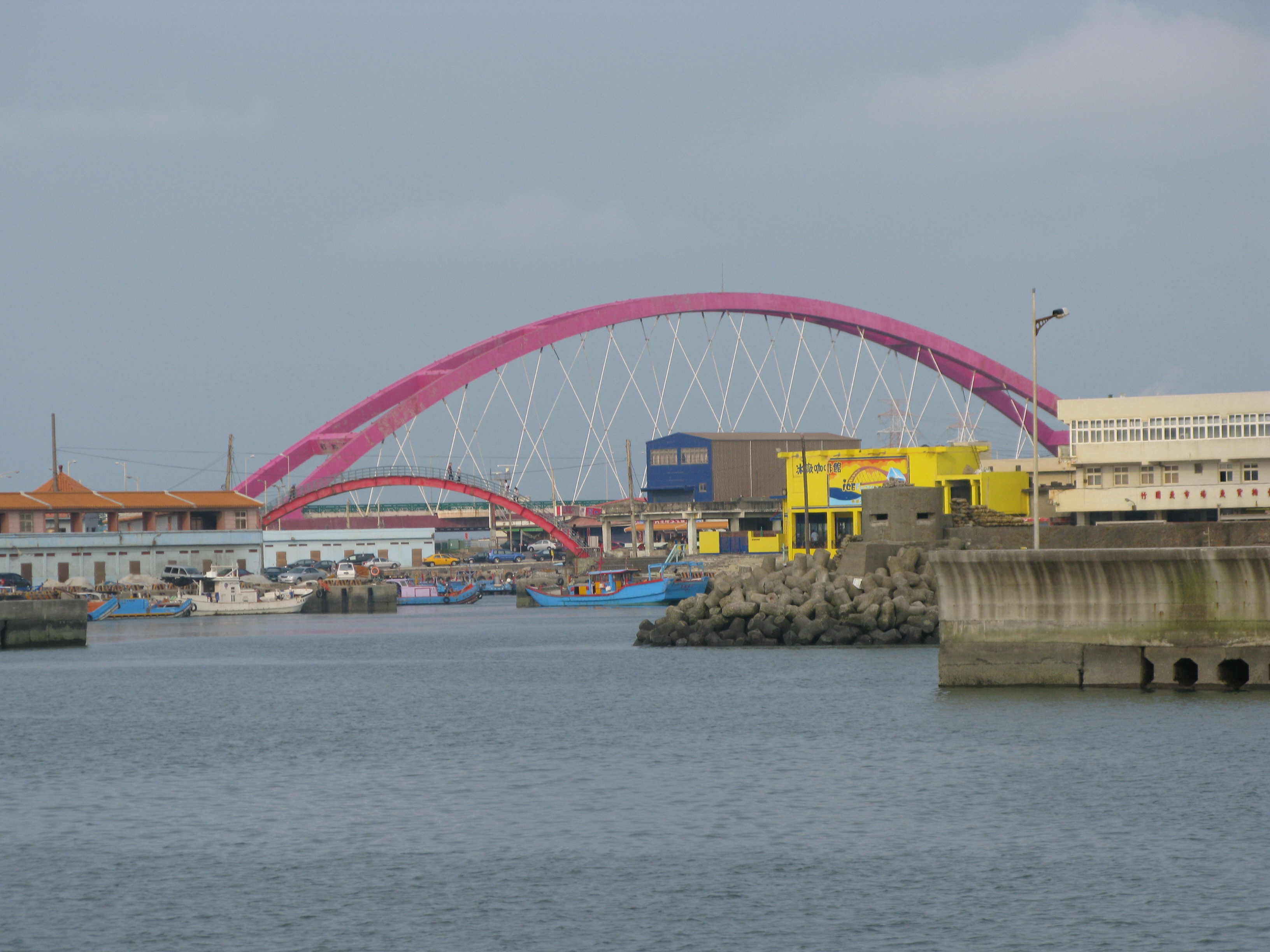 桃園縣大園鄉竹圍漁港彩虹橋。